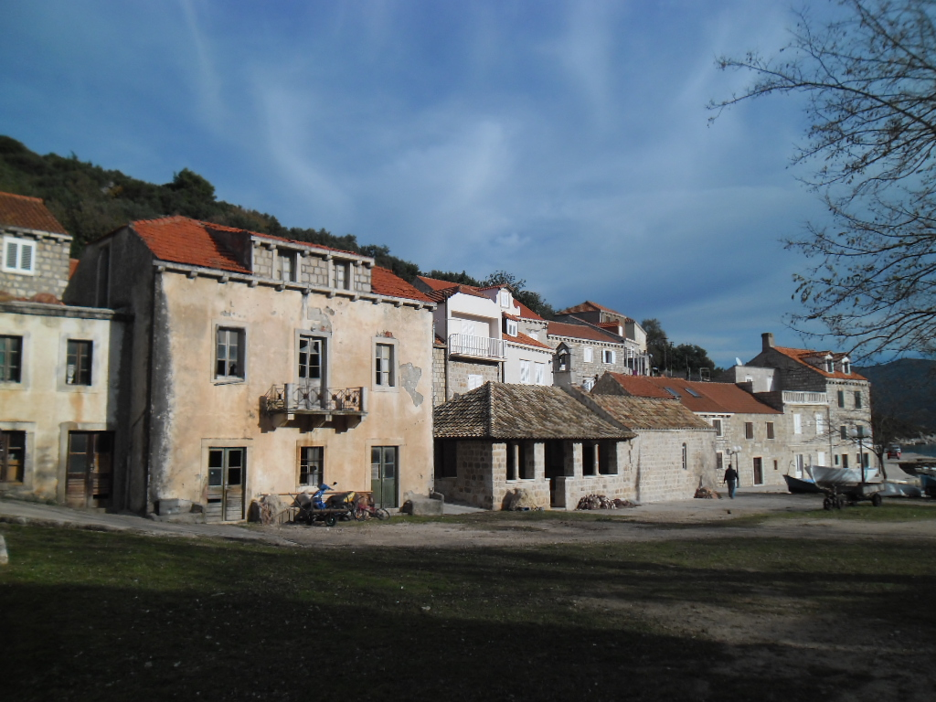 mjesto Suđurađ na otoku Šipanu